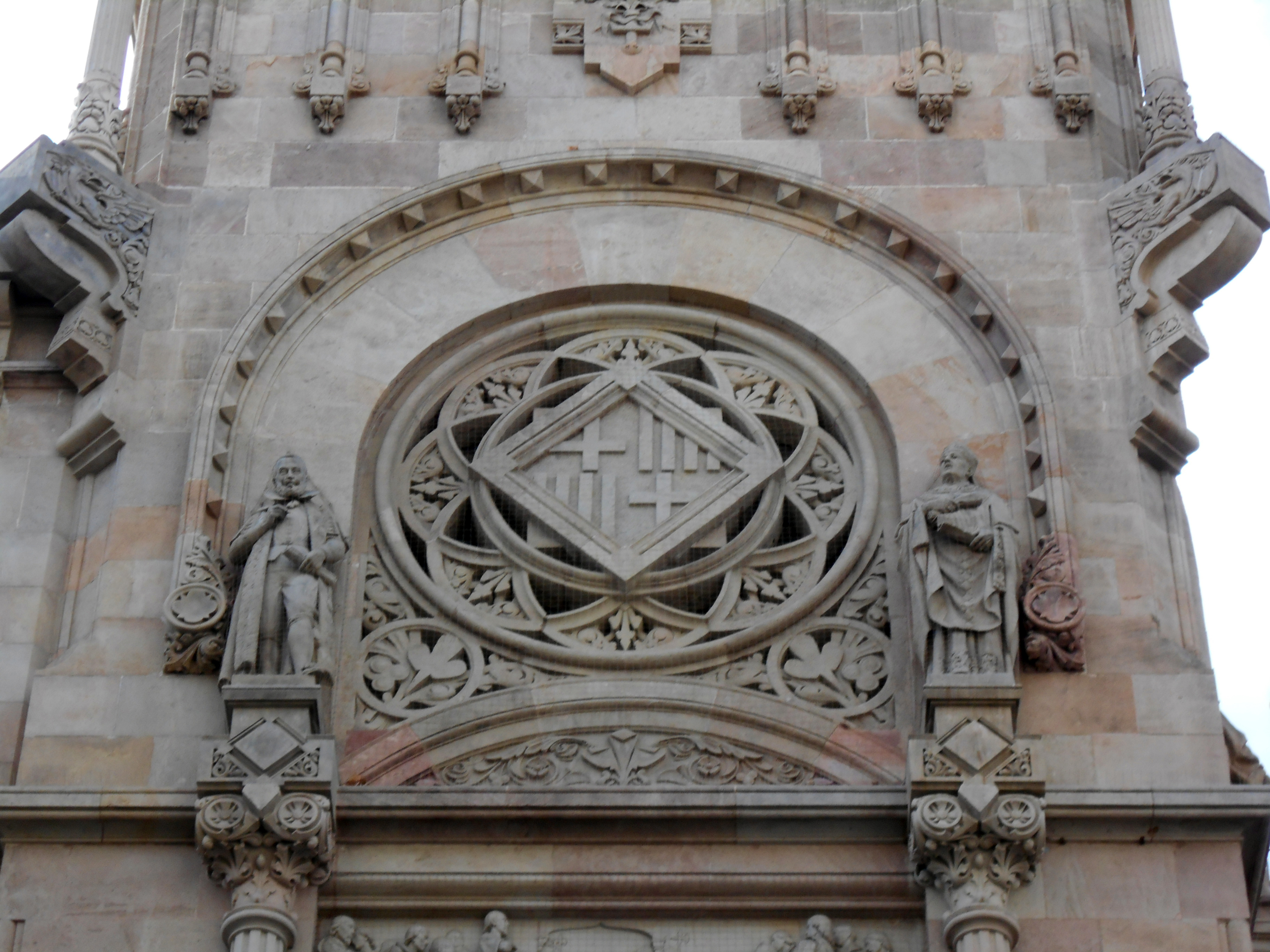 Esculturas del Palacio de Justicia de Barcelona: Miquel Ferrer, de Josep Maria Barnadas; y Vidal de Canyelles, de Francesc Pagès i Serratosa.